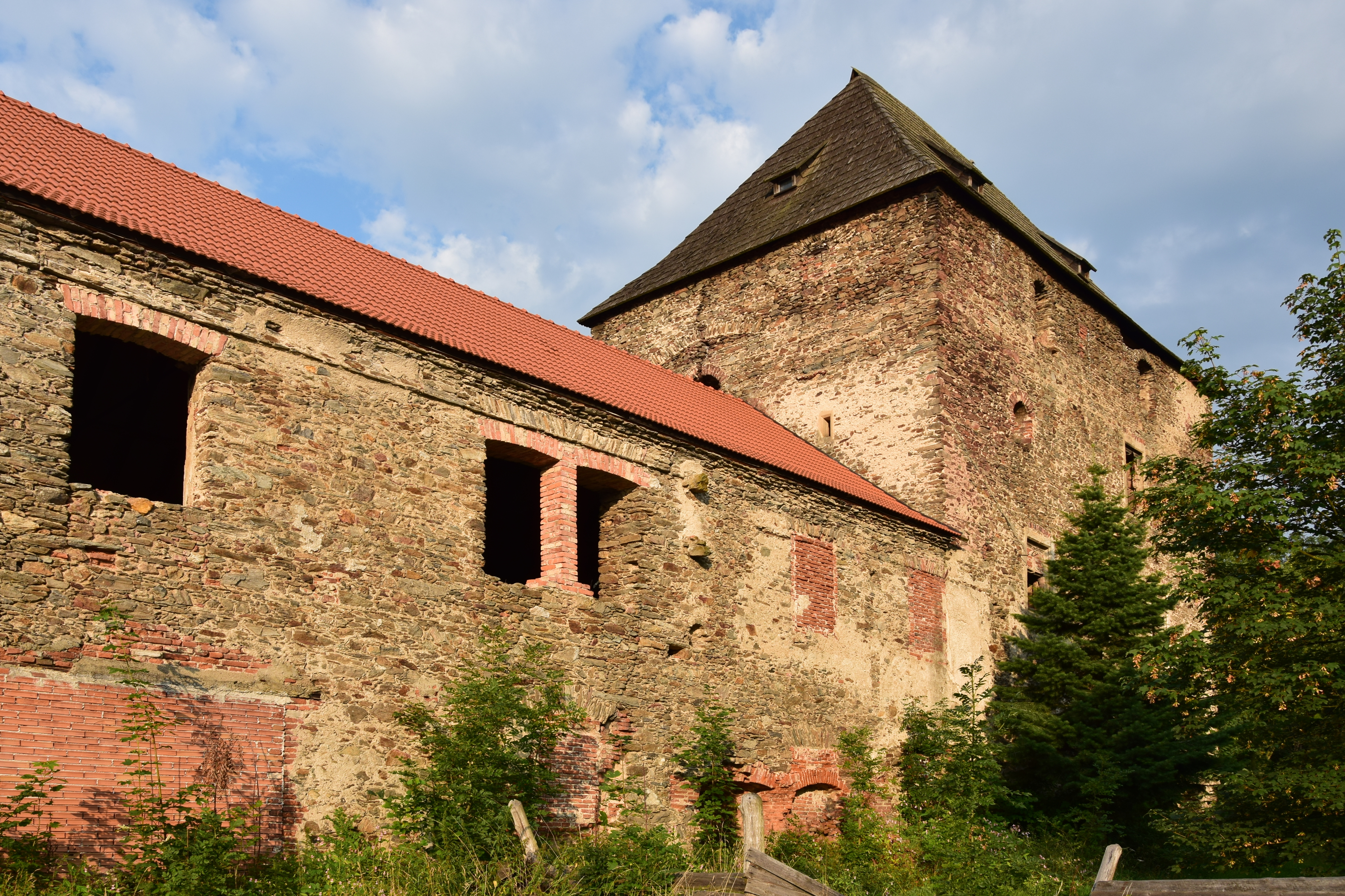 Čachrov – renesanční křídlo tvrze s gotickým věžovitým palácem